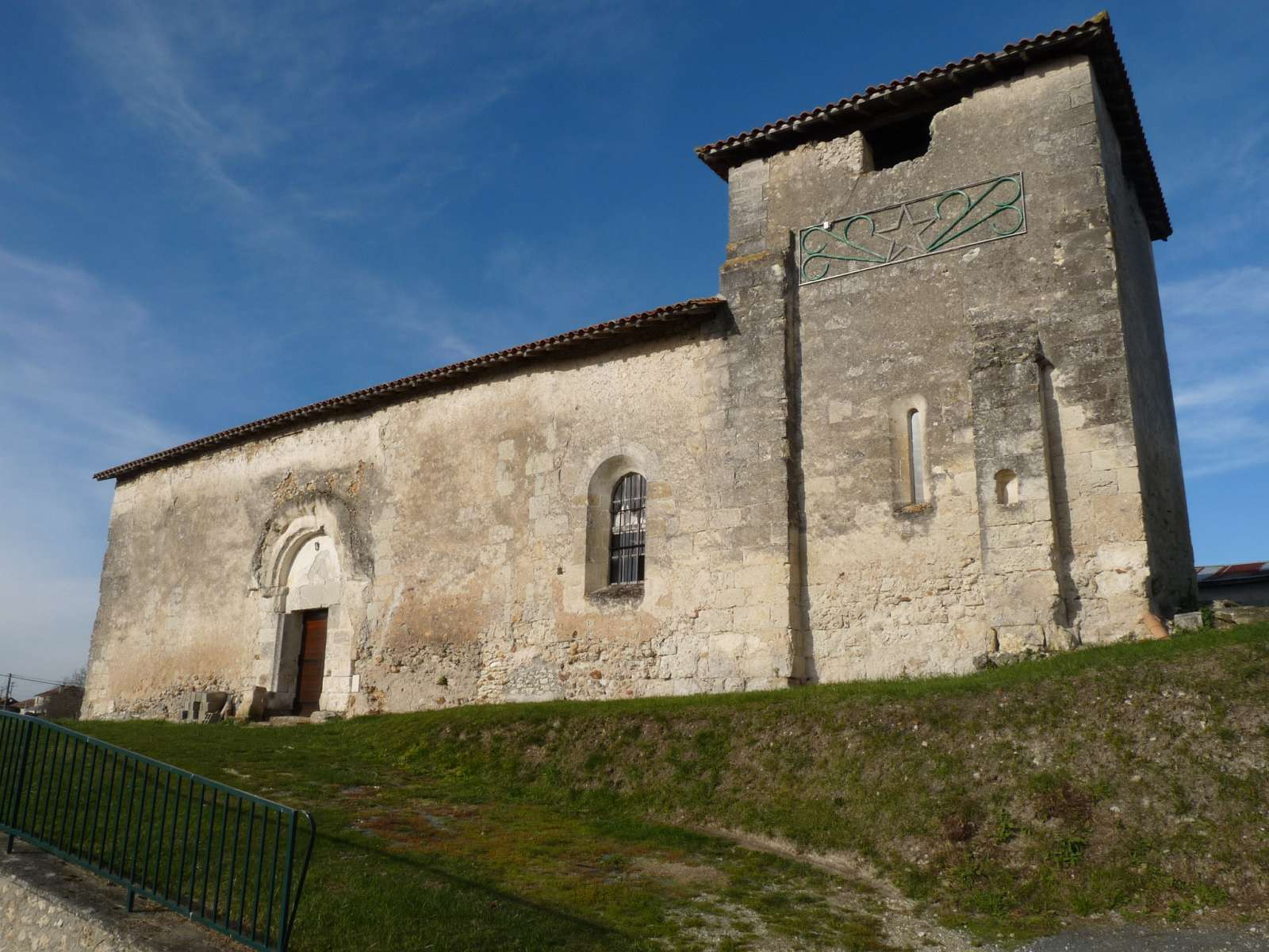 ancienne église d'Epeluche, Dordogne, France